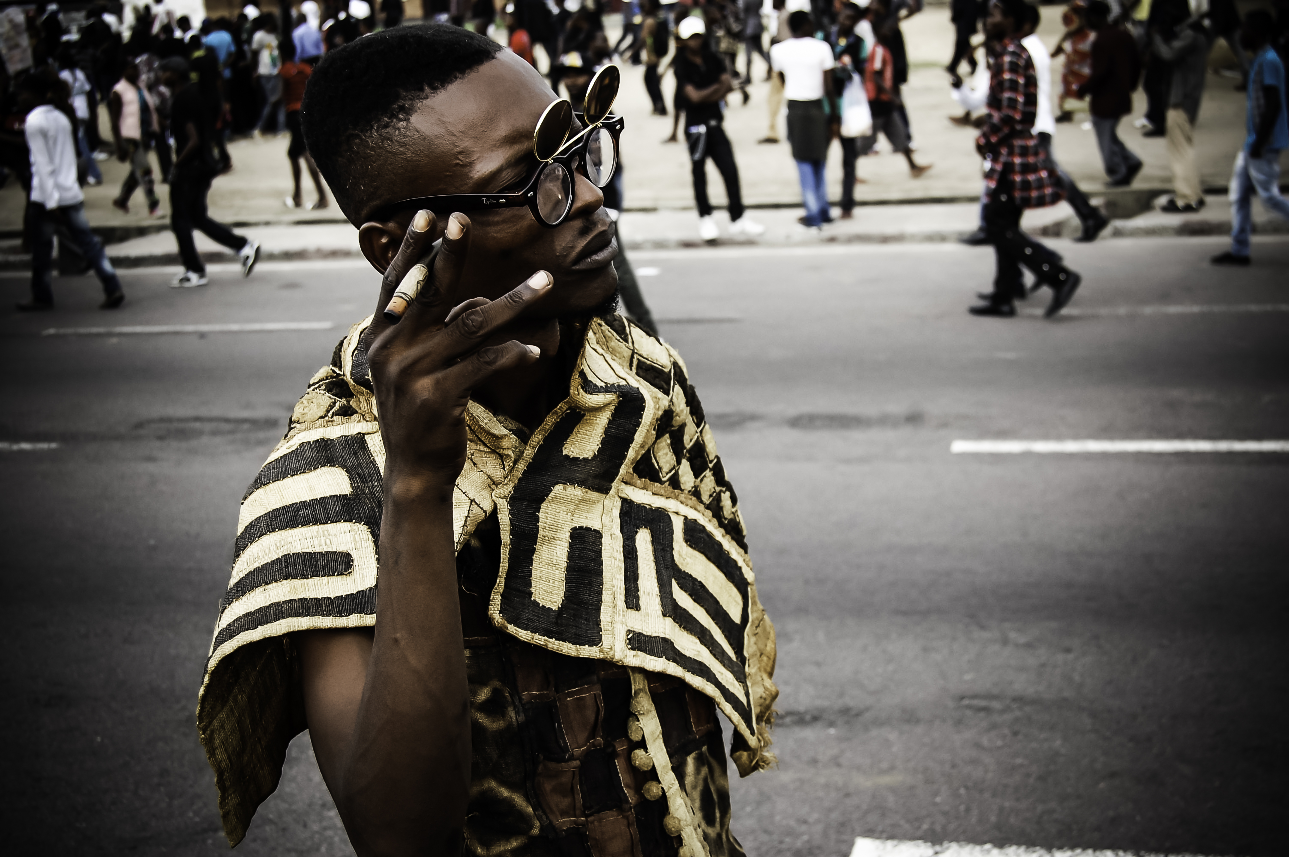 un sapeur, elegant exhibant son style, des tissus tshokwe provenant de Kasai, This is an image of Cultural Fashion or Adornment from Democratic Republic of the Congo